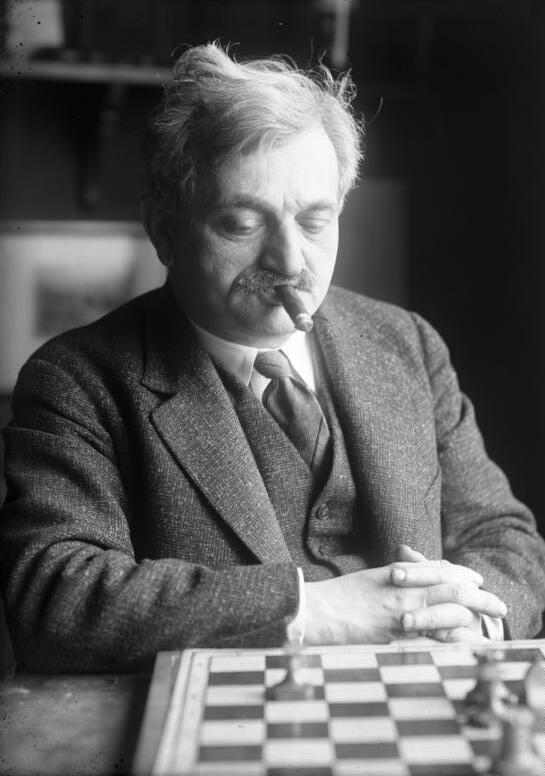 Dr. Emanuel Lasker der deutsche Ex-Schachweltmeister, beabsichtigt im Frühjahr dieses Jahres seine Weltmeisterschaft wieder zurückzuerobern! Dr. Emanuel Lasker in seinem Berliner Heim.